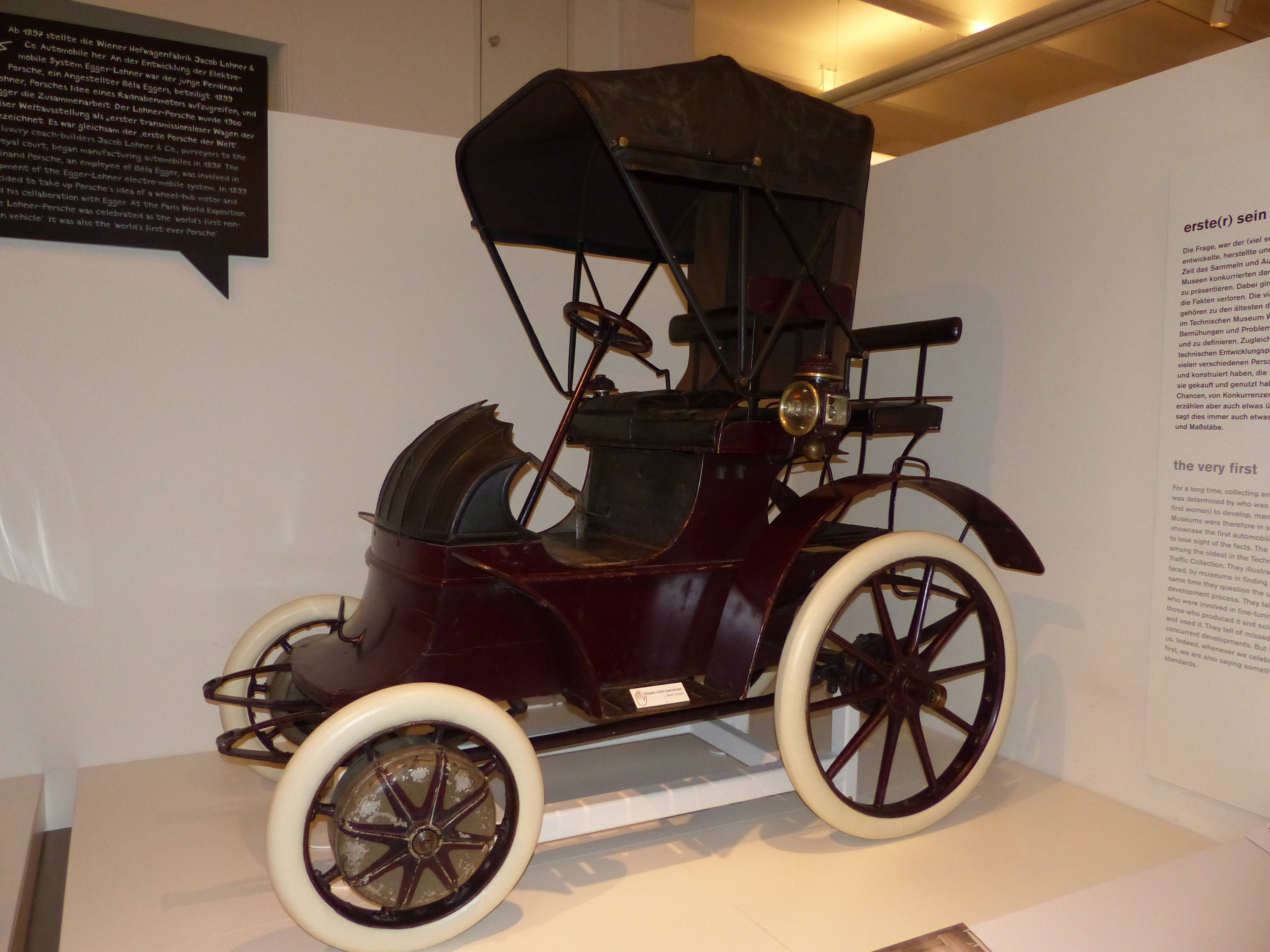 Elektrischer Phaéton, System Lohner-Porsche, Modell Nr. 27, 1900-1902, Wien; Exponat im Technischen Museum Wien